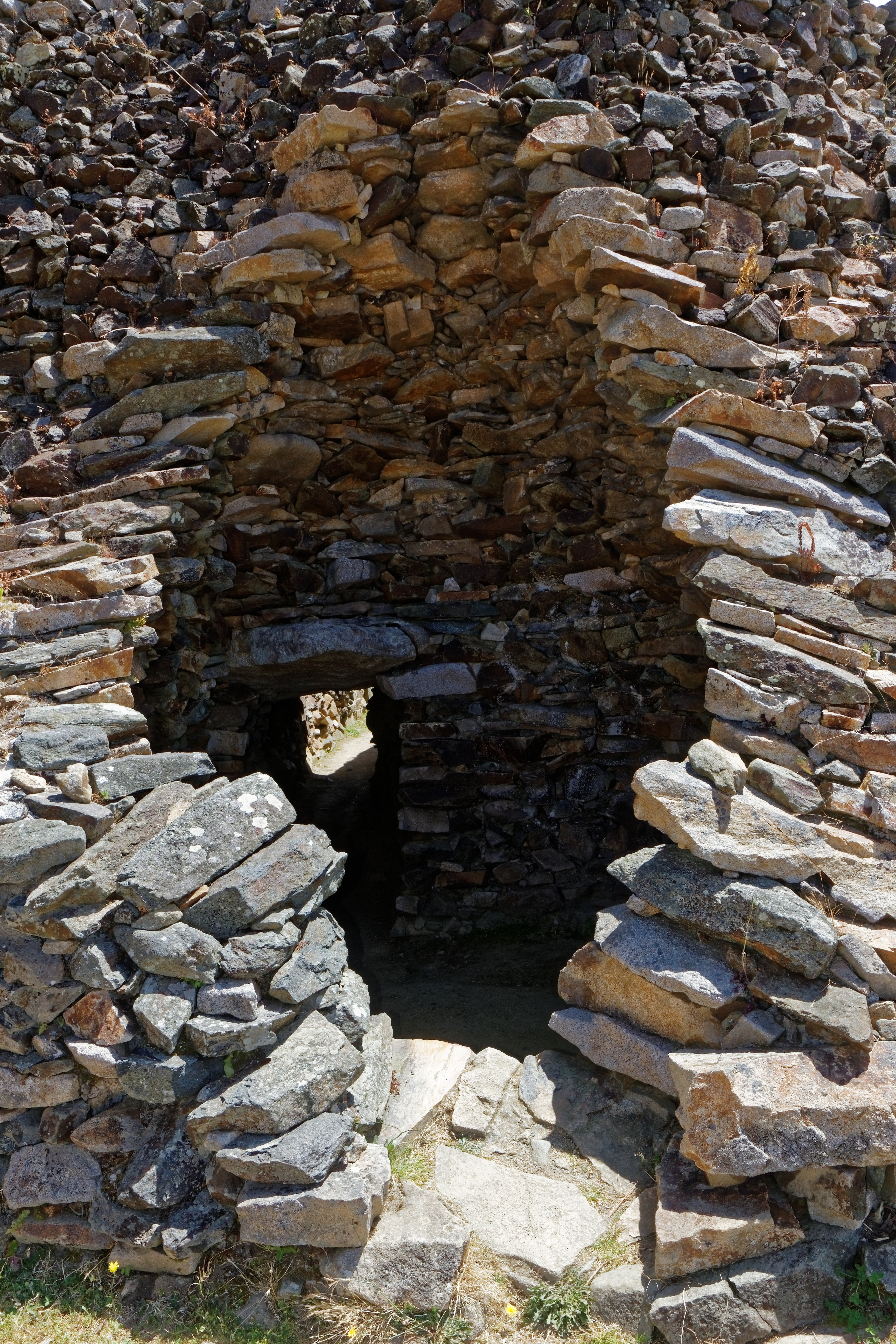 Panorama du Cairn de Barnenez à Plouezoc'h dans le Finistère. .